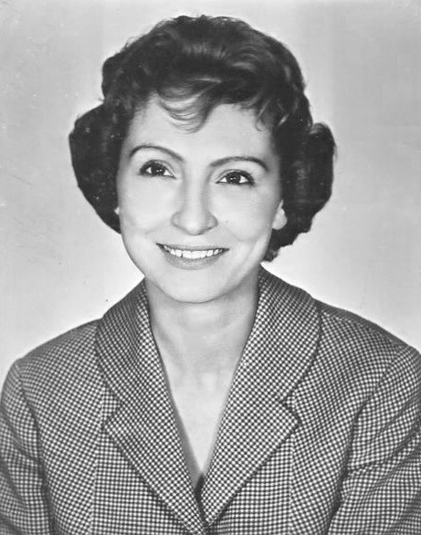 Liliana Feldmann